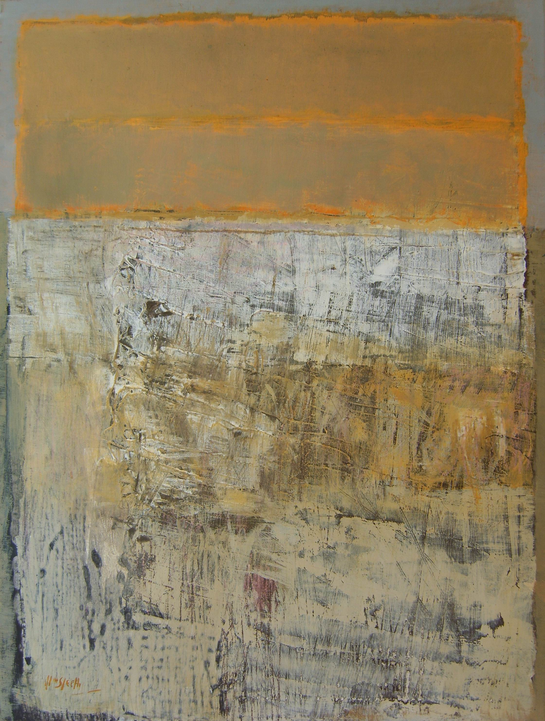 Cleethorpes (Wet Sands) 2007, 80 x 60 cm